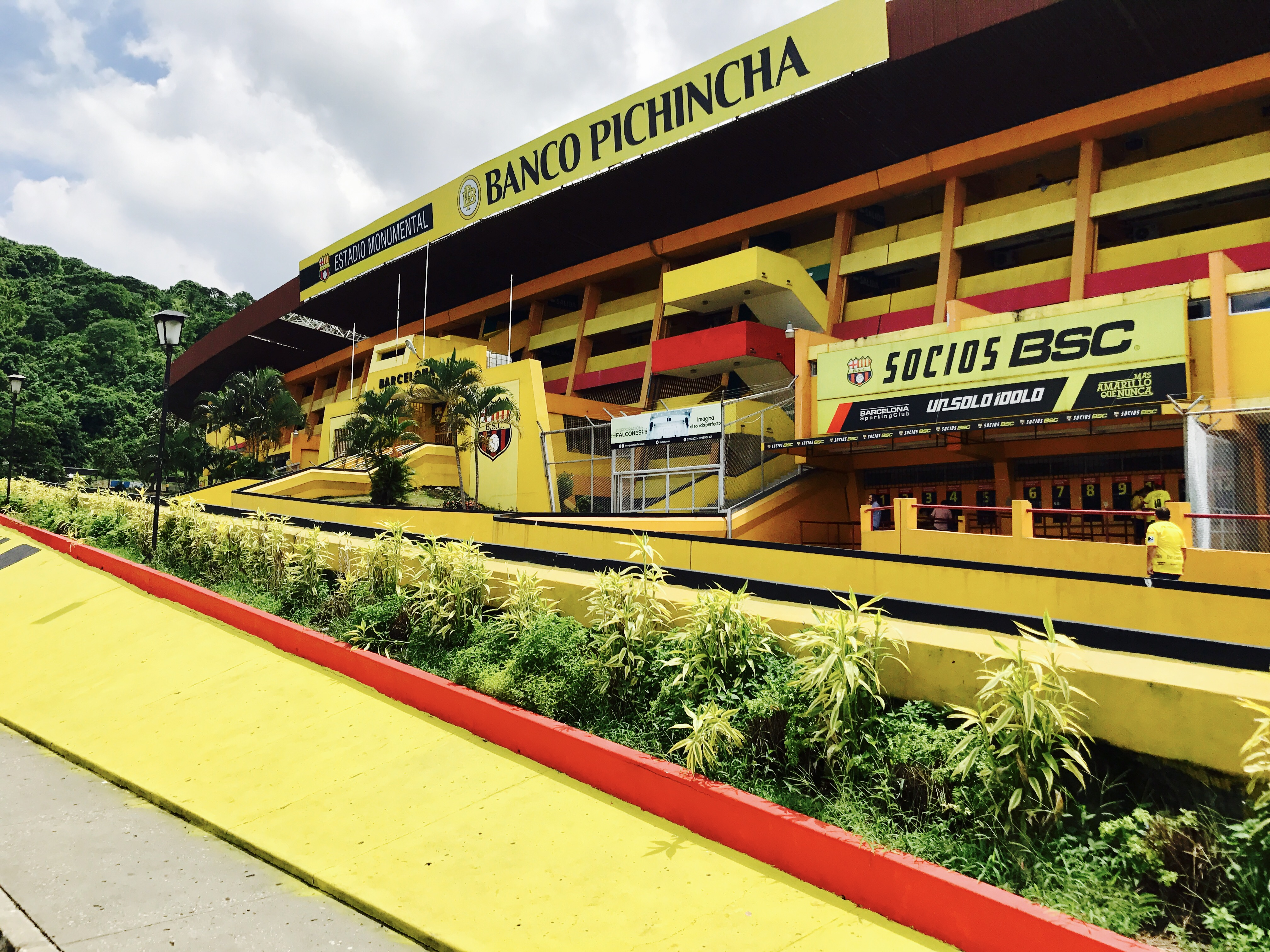 Lado Oeste, Estadio Monumental, área de Socios.